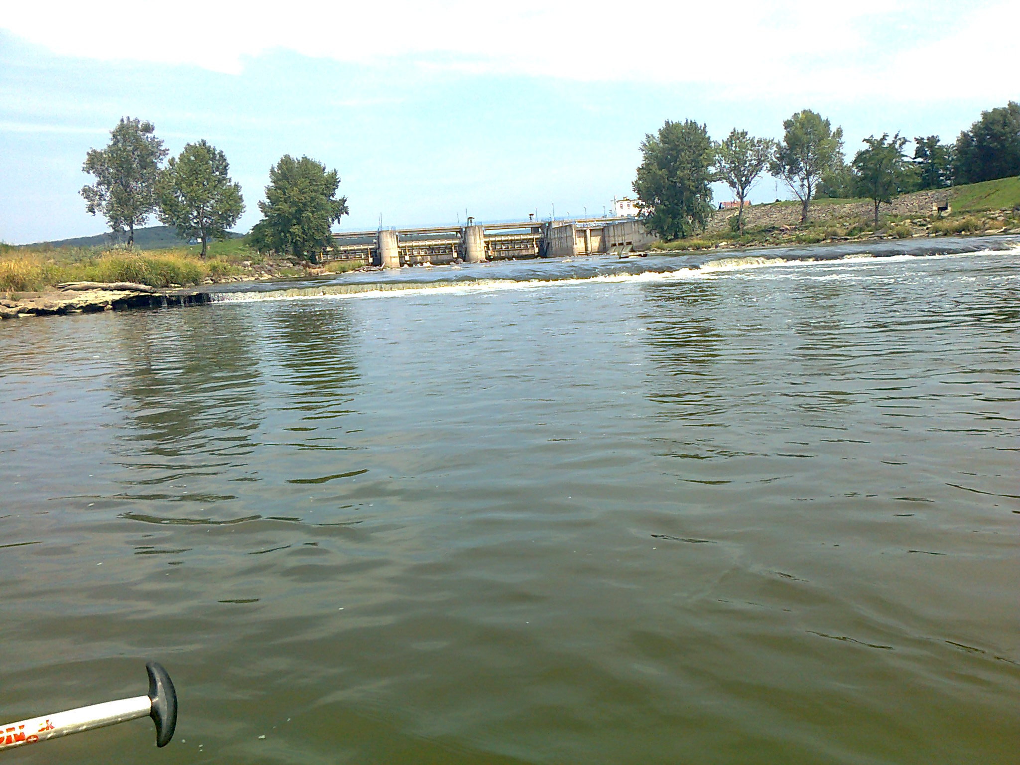 Priehrada Kozmálovce